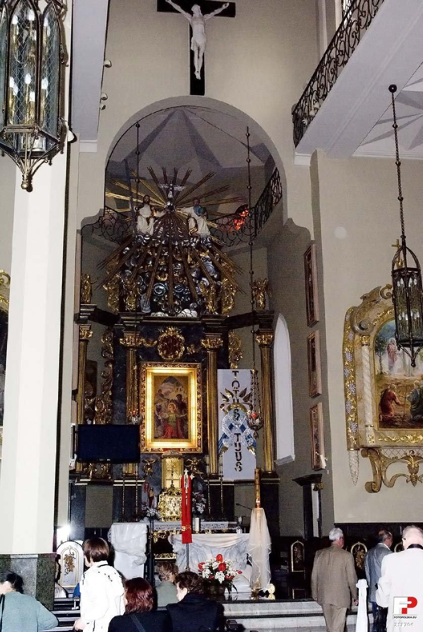 Ołtarz w kościele św. Doroty.